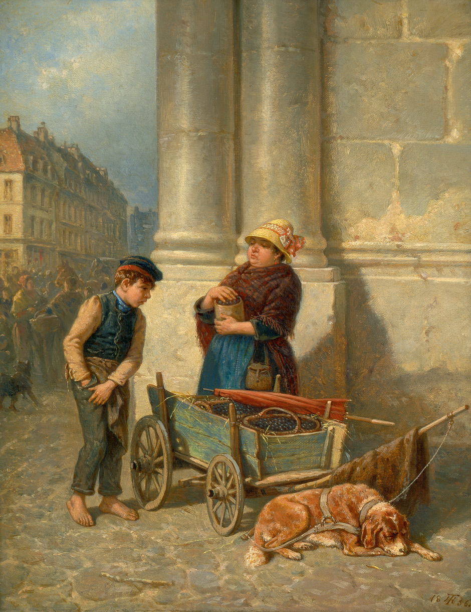 Die Pflaumenverkäuferin. Unten rechts monogrammiert und datiert "TH 1856".